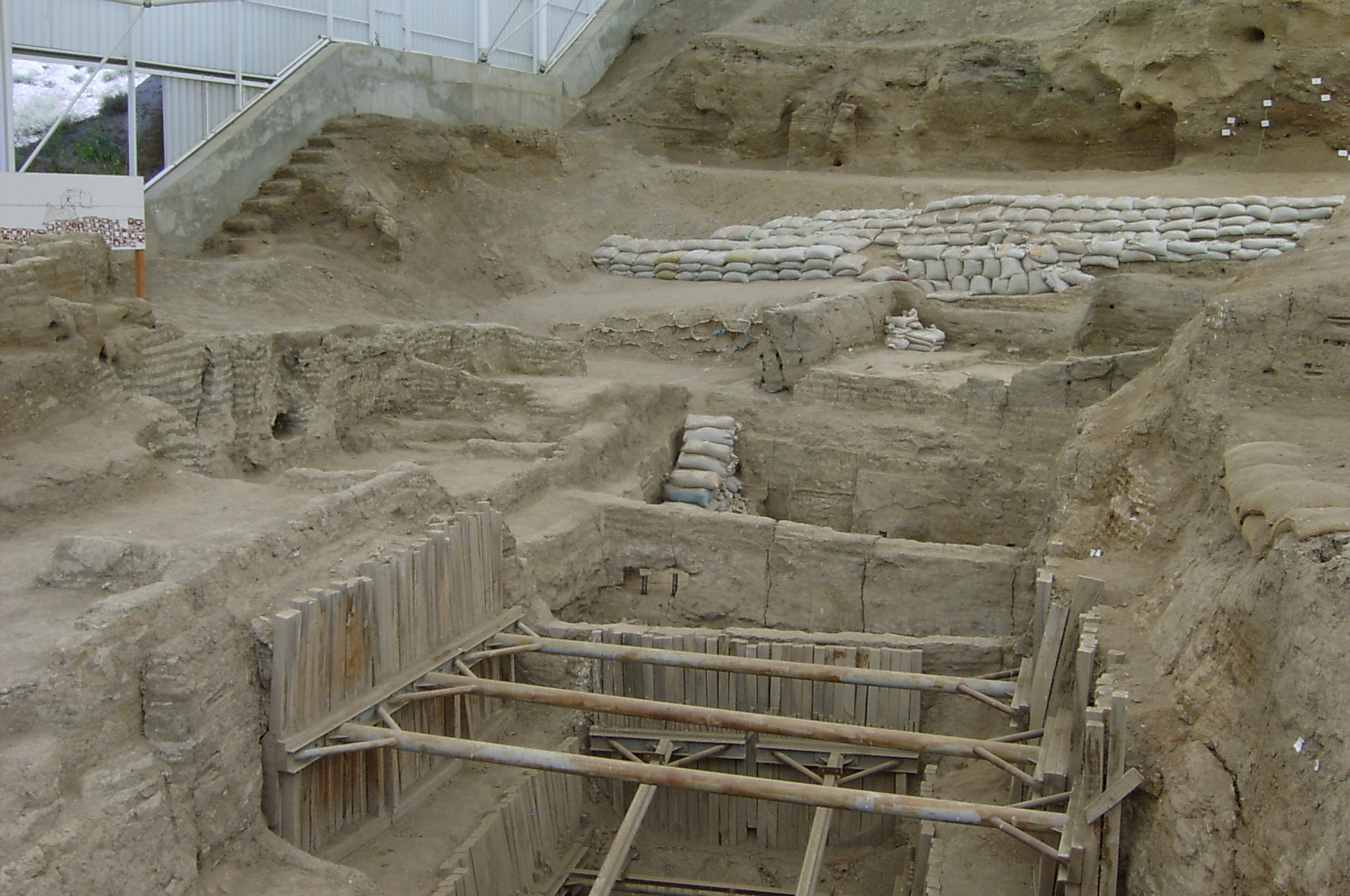 Çatal Hüyük excavations